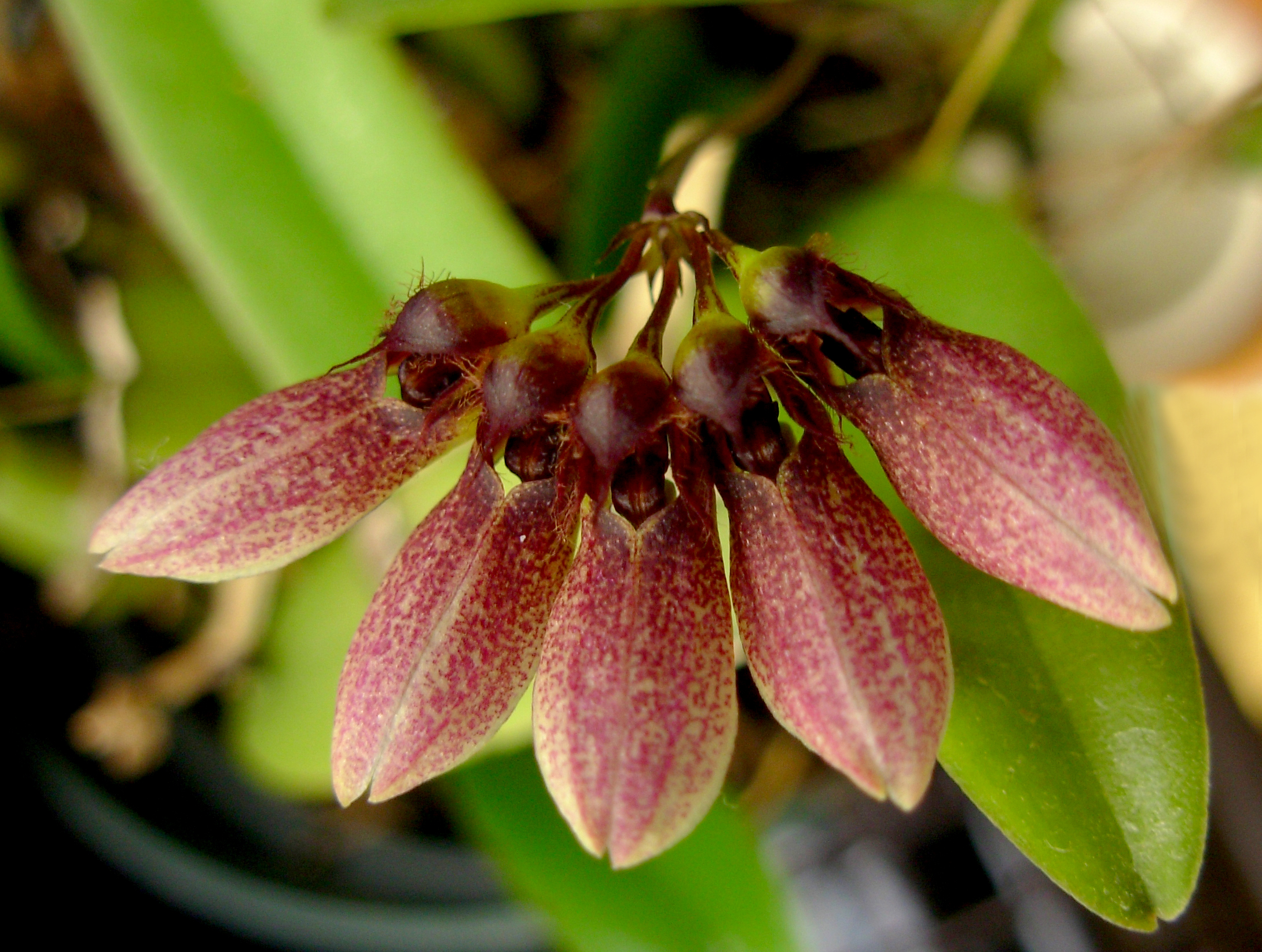 Bulbophyllum flabellum-veneris, syn. Bulbophyllum lepidum